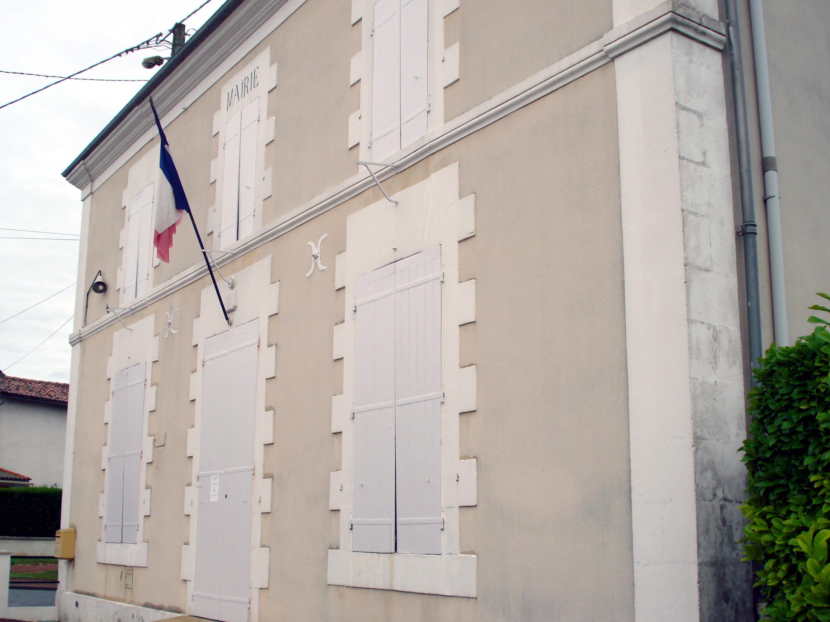 La mairie de La Villedieu (Charente-Maritime)